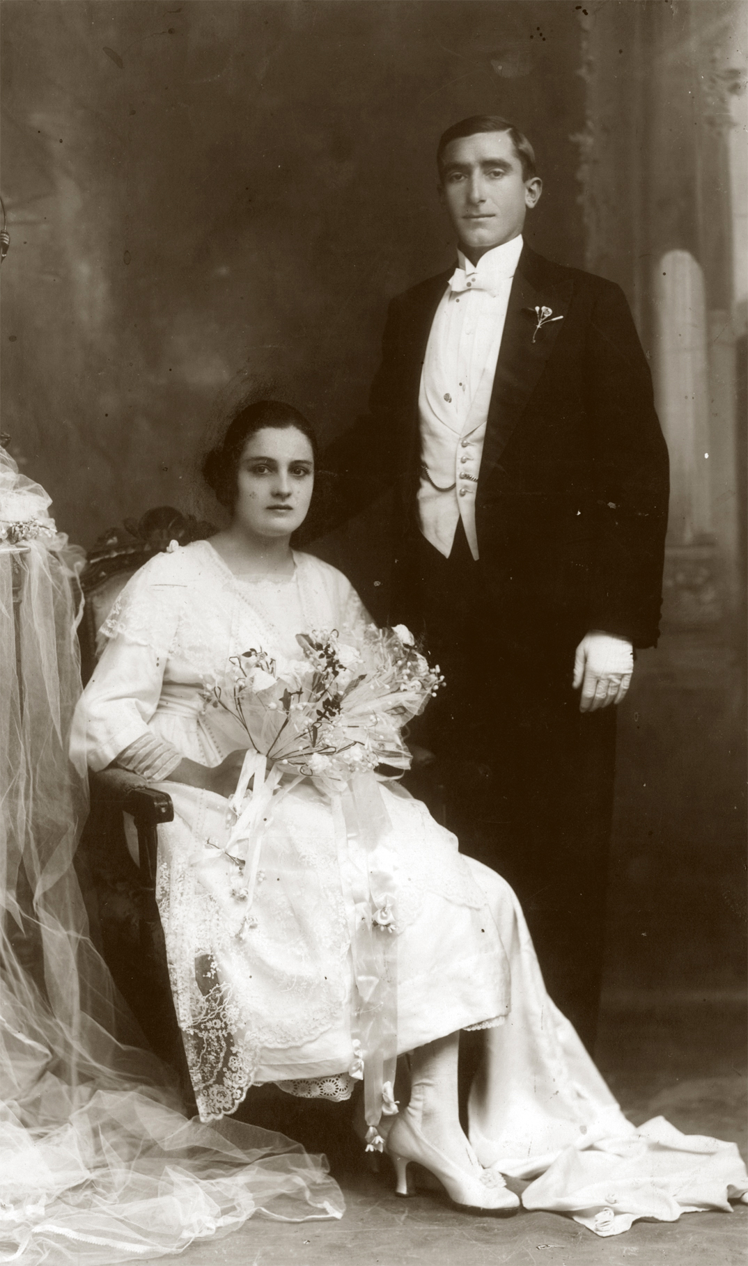 Fotografía vertical donde están posando al centro de pie Galileo Vitali de traje y, su esposa, Margarita Piacenza sentada con el vestido de boda y un ramo de flores.